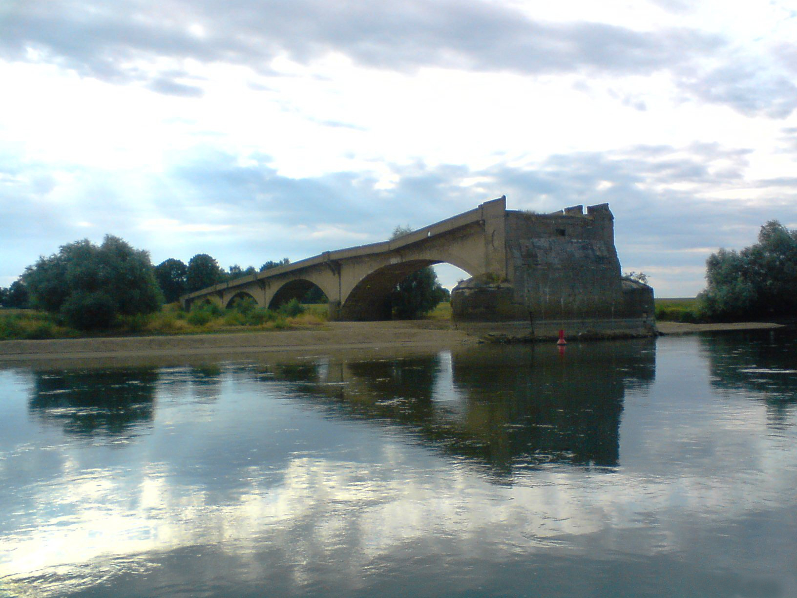 Zniszczony w 1945 roku most nad Odrą w Kłopocie.